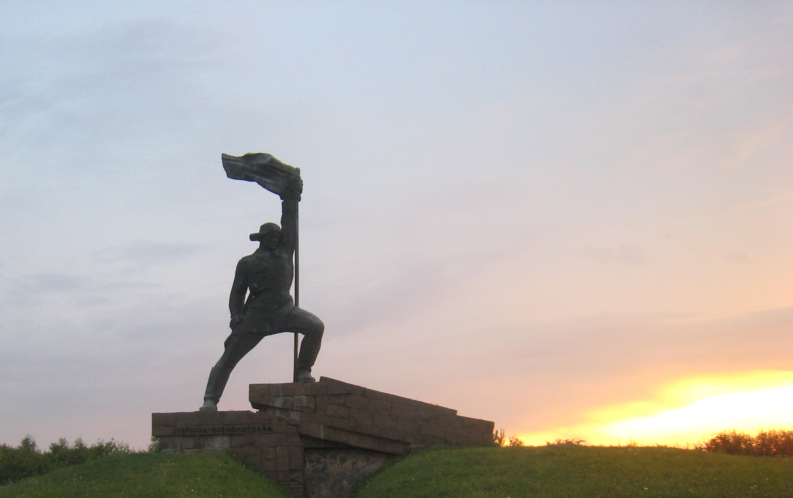 Monumento ai liberatori dell'Ucraina al confine tra Užhorod e Vyšné Nemecké